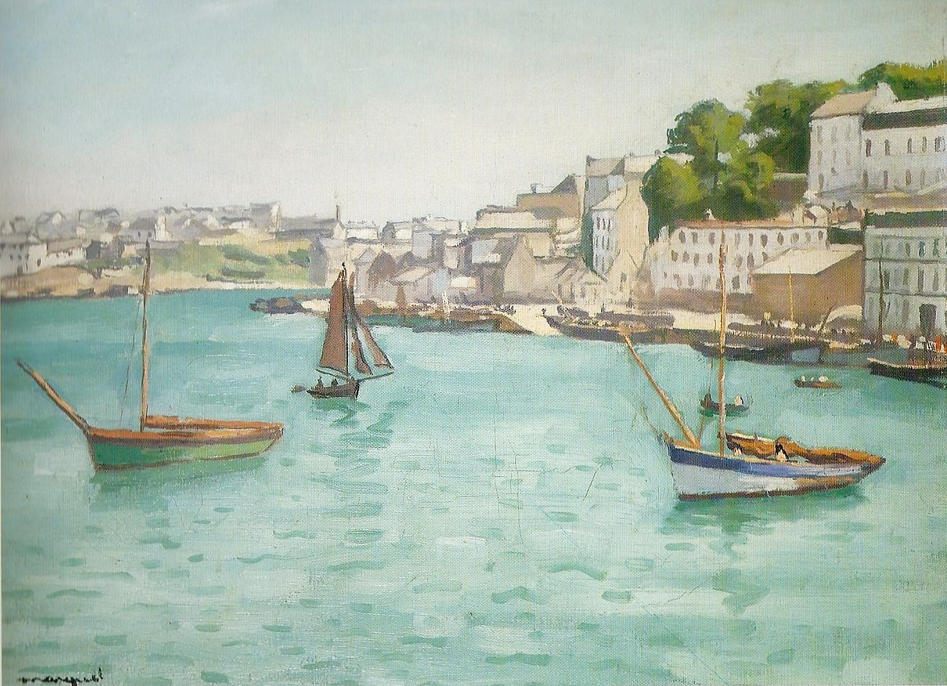 Albert Marquet : Le port d'Audierne (1928, collection particulière).